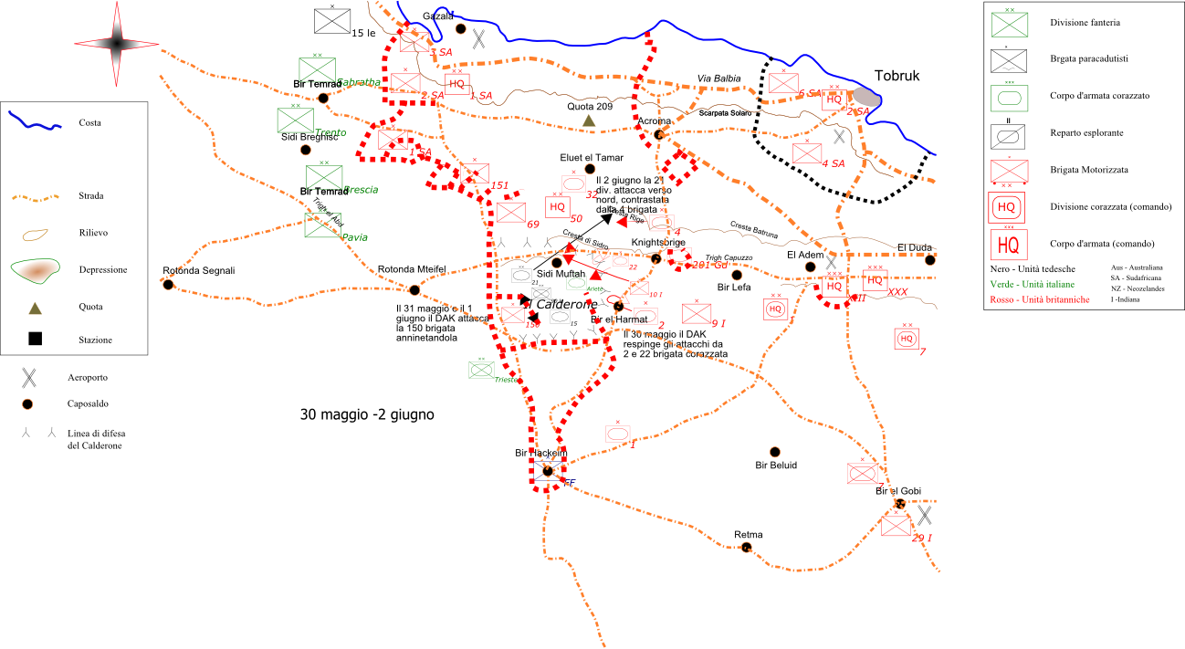 Eventi della battaglia di Ain el Gazala dal 30 maggio al 2 giugno 1942